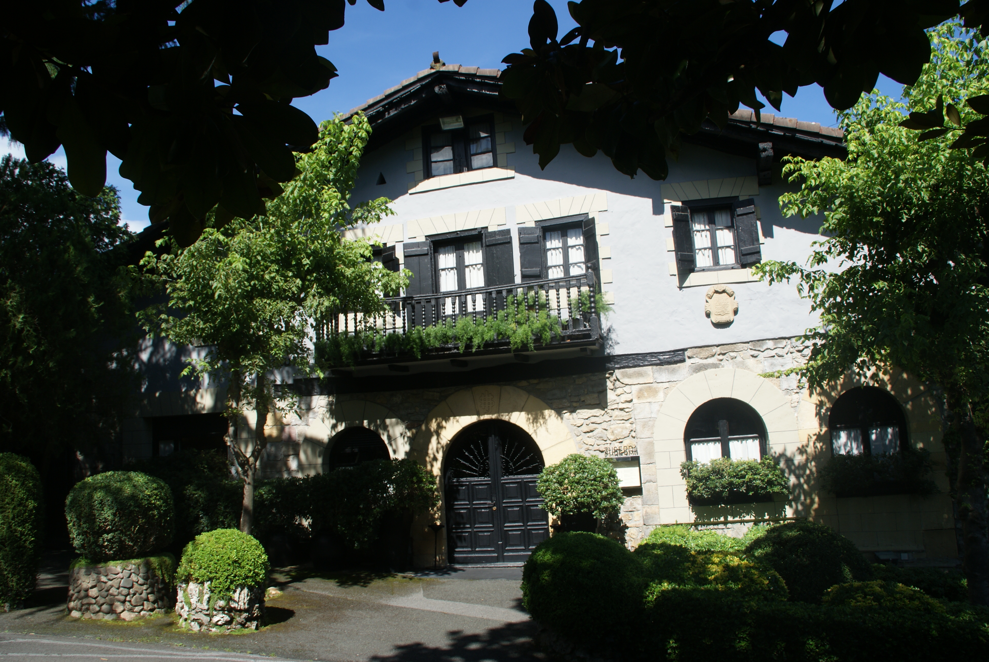 Garbuño baserria, Oiartzun